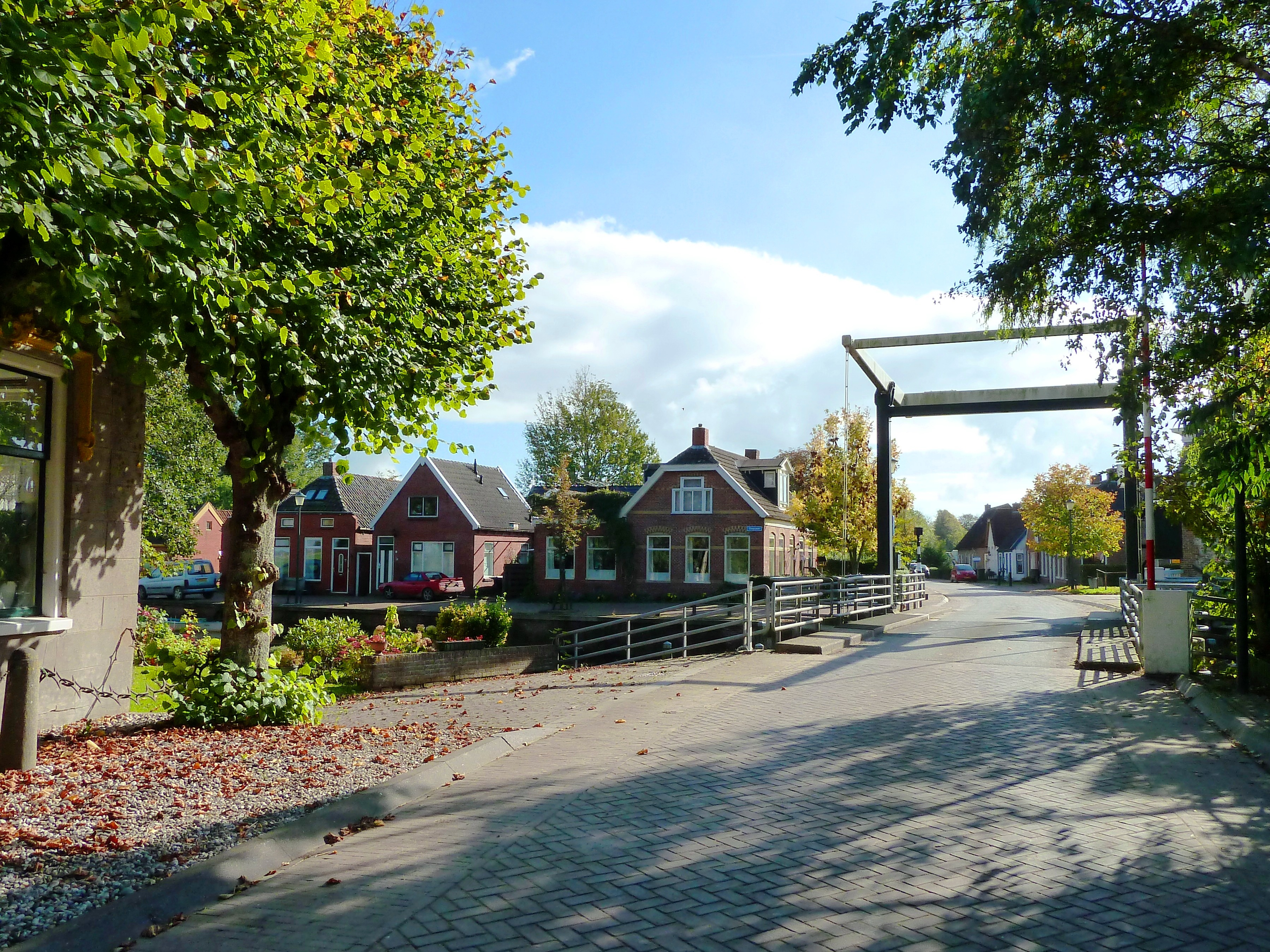 Brug over het Zijldiep (gekanaliseerde Lauwers) in Pieterzijl met links de vroegere kade Diepswal.